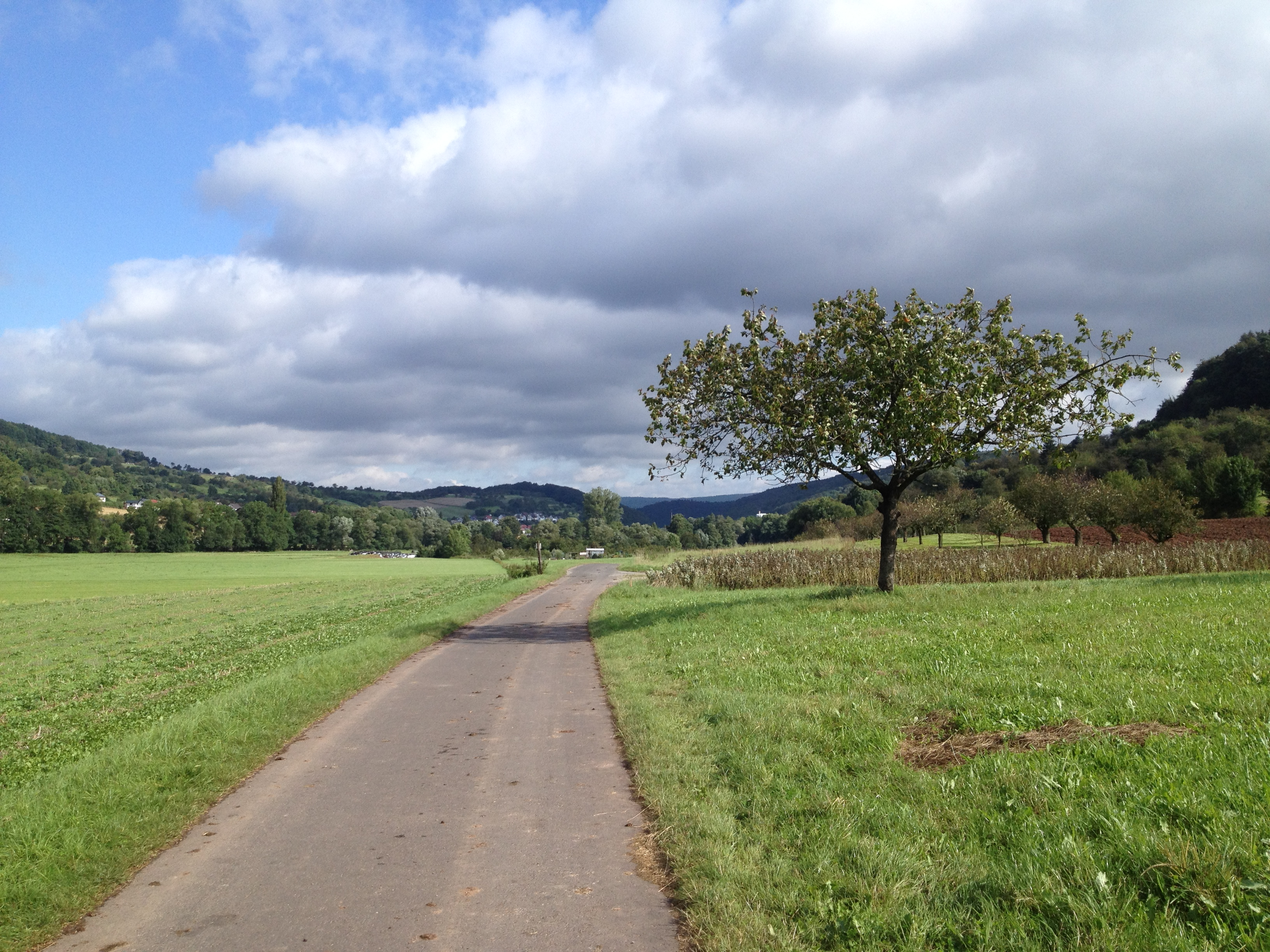 Herkules-Wartburg-Radweg Alternativstrecke und Meißner-Radrundtour auf einem asphaltierten Wirtschaftsweg zwischen Trubenhausen und Hundelshausen